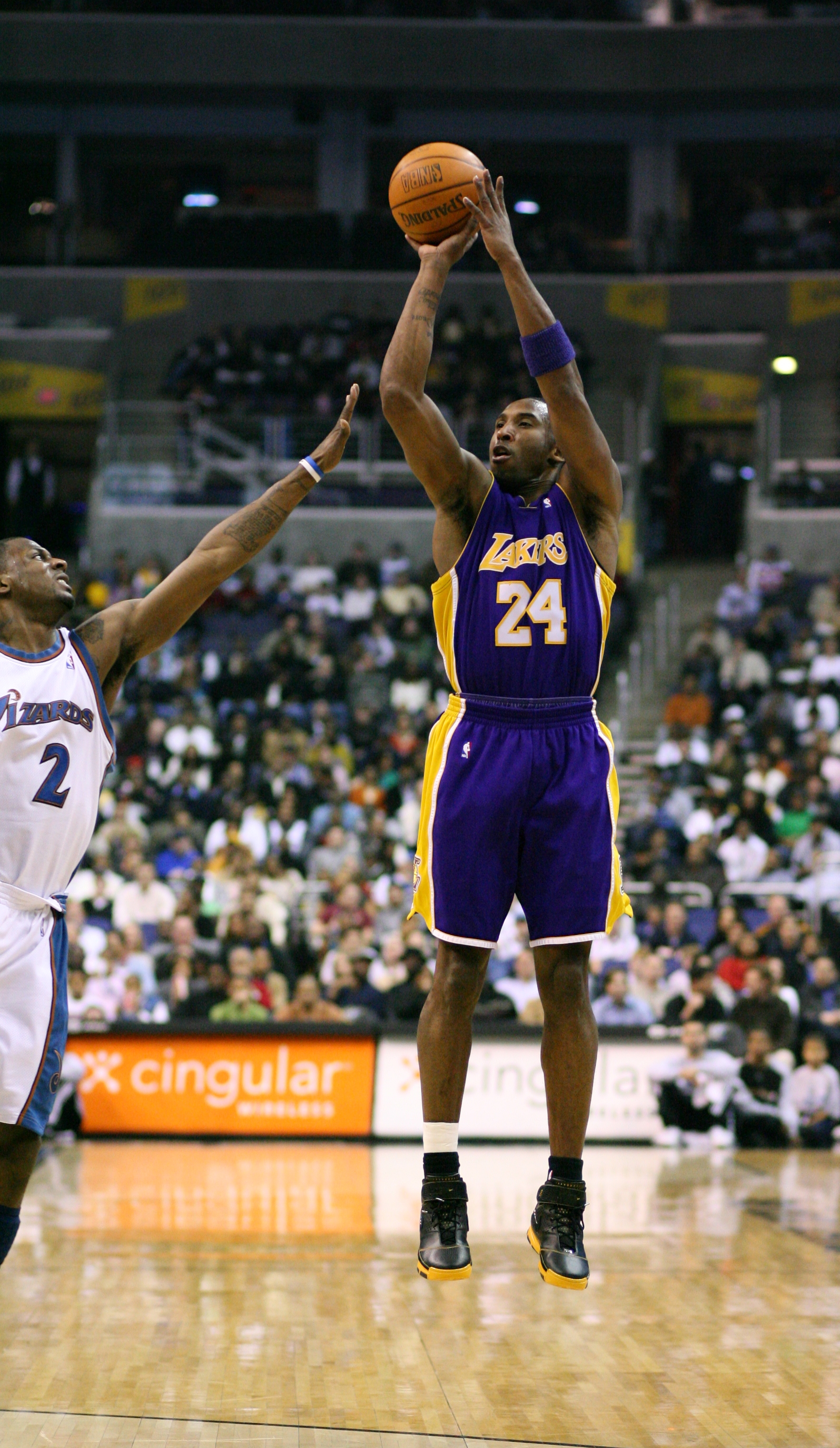 RO9A3241